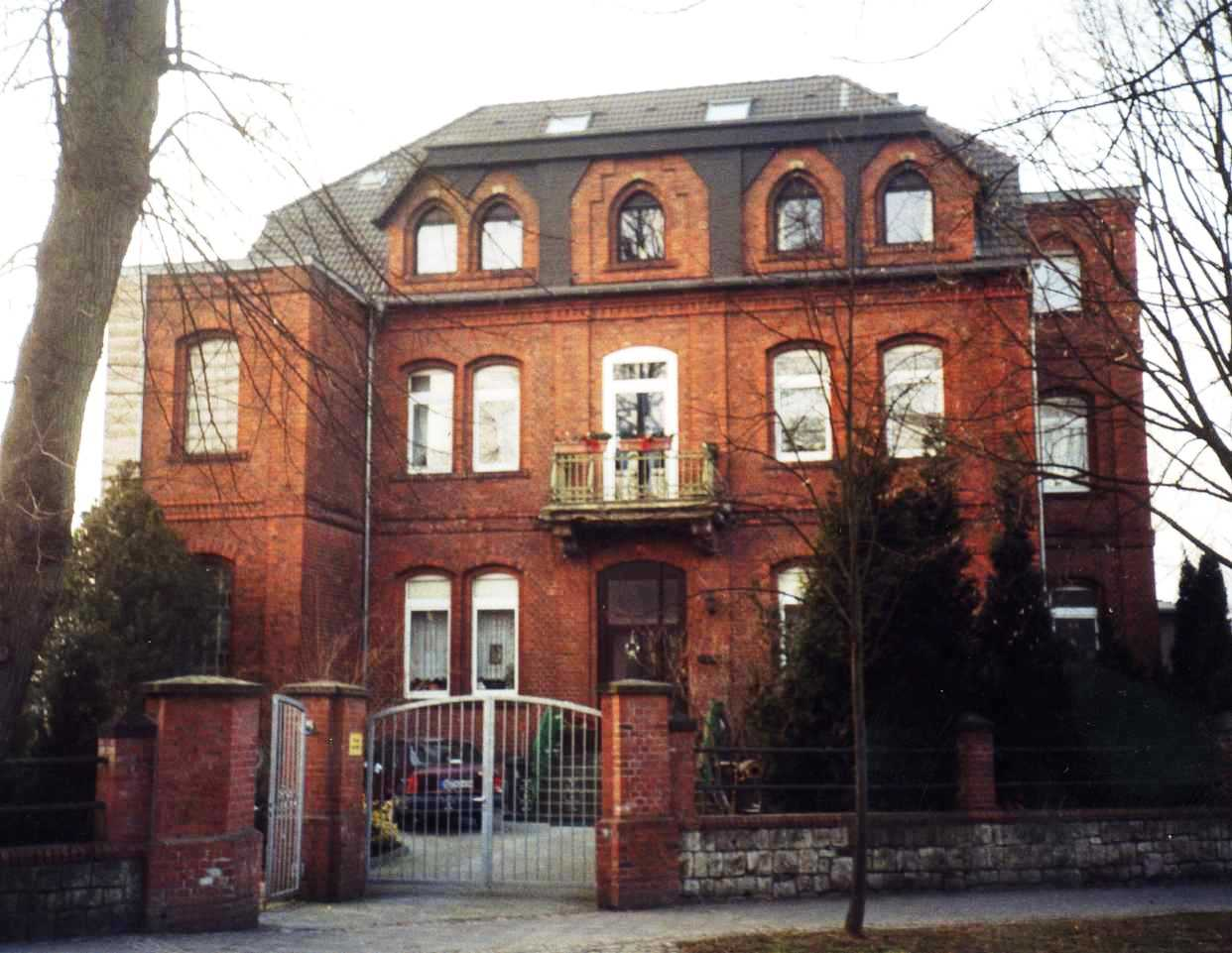 Ehem. Mairie/Bürgermeisterei von Nothberg